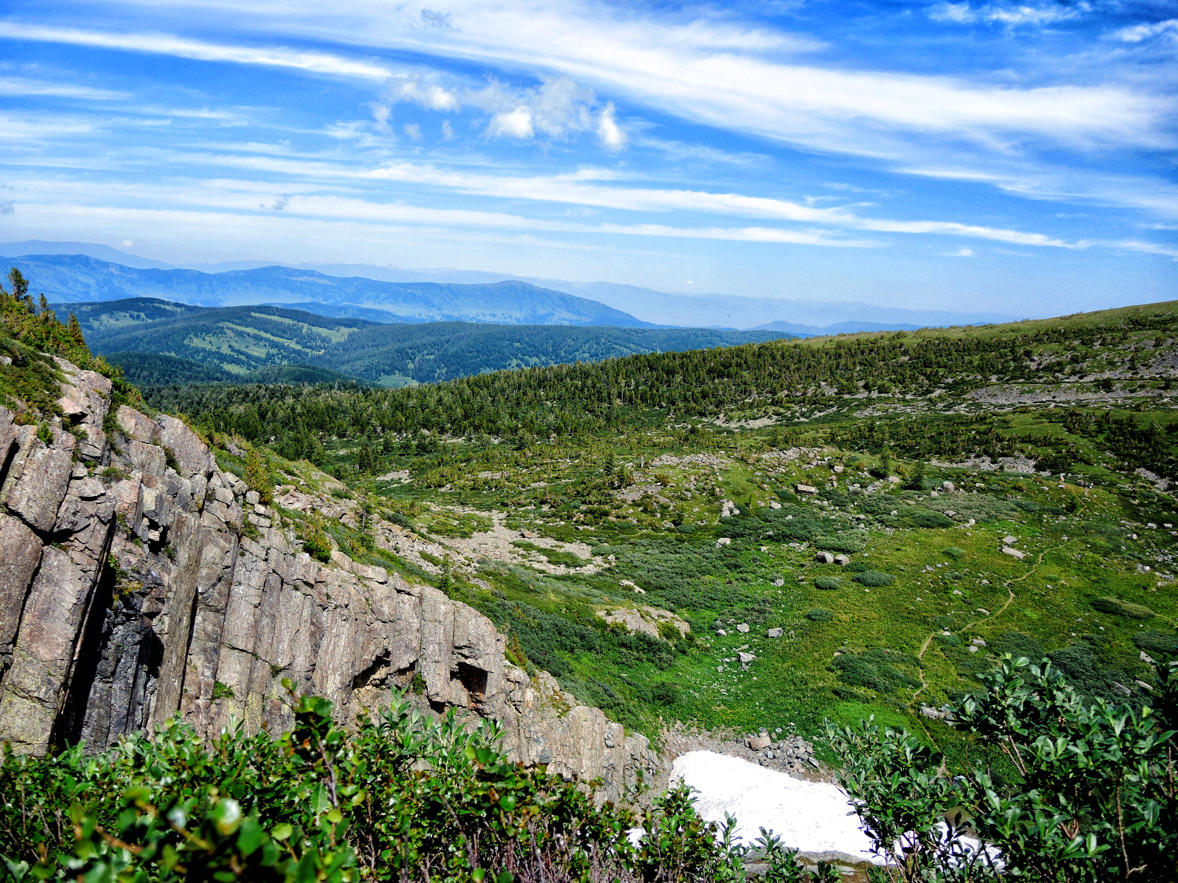 Катунский заповедник: Усть-Коксинский район, Алтай This image is related to the protected area of Russia number 0400042